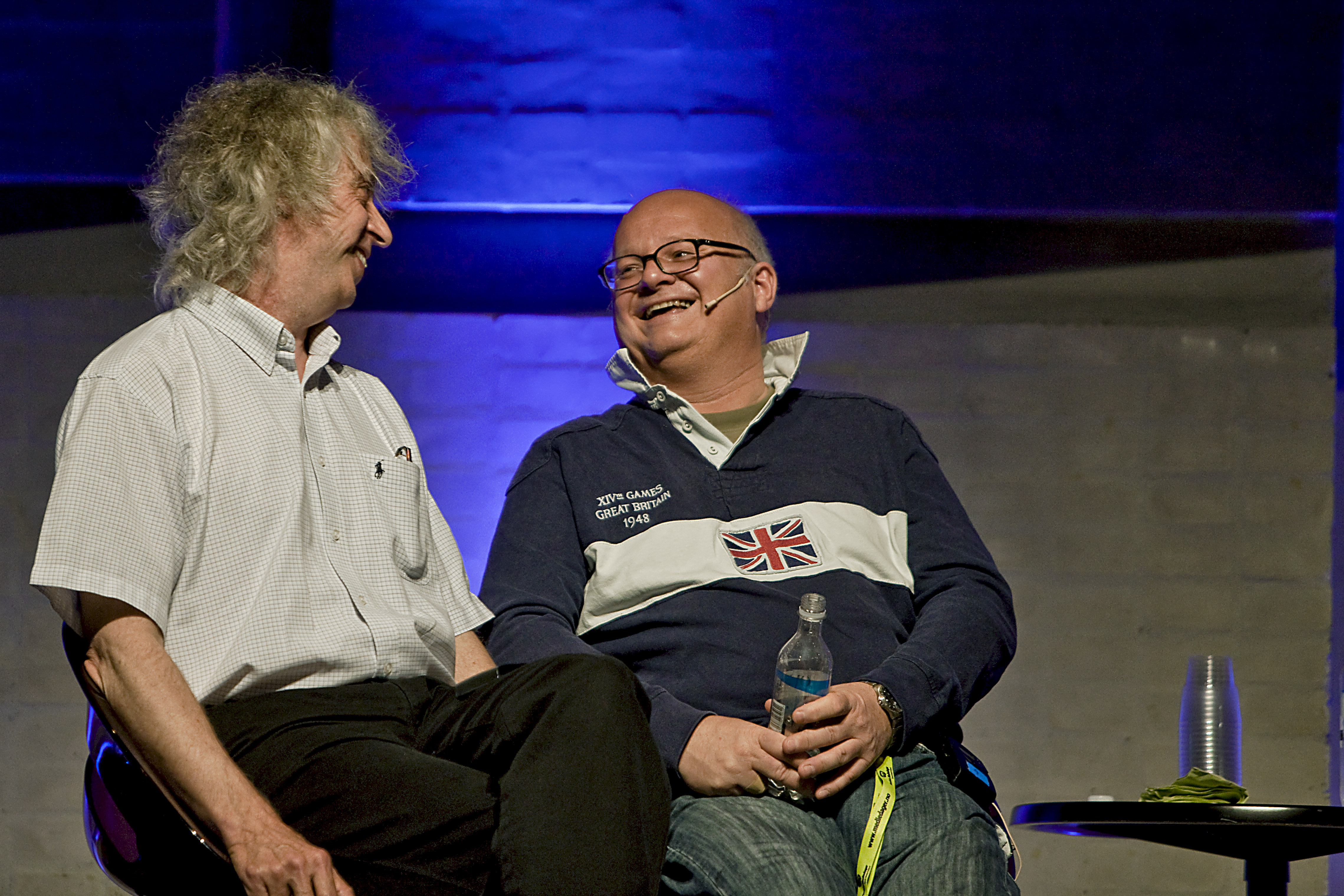 Bjelke og Friis fra Herreavdelingen på Nordiske Mediedager i Bergen, 2011. Foto: Jarle H. Moe